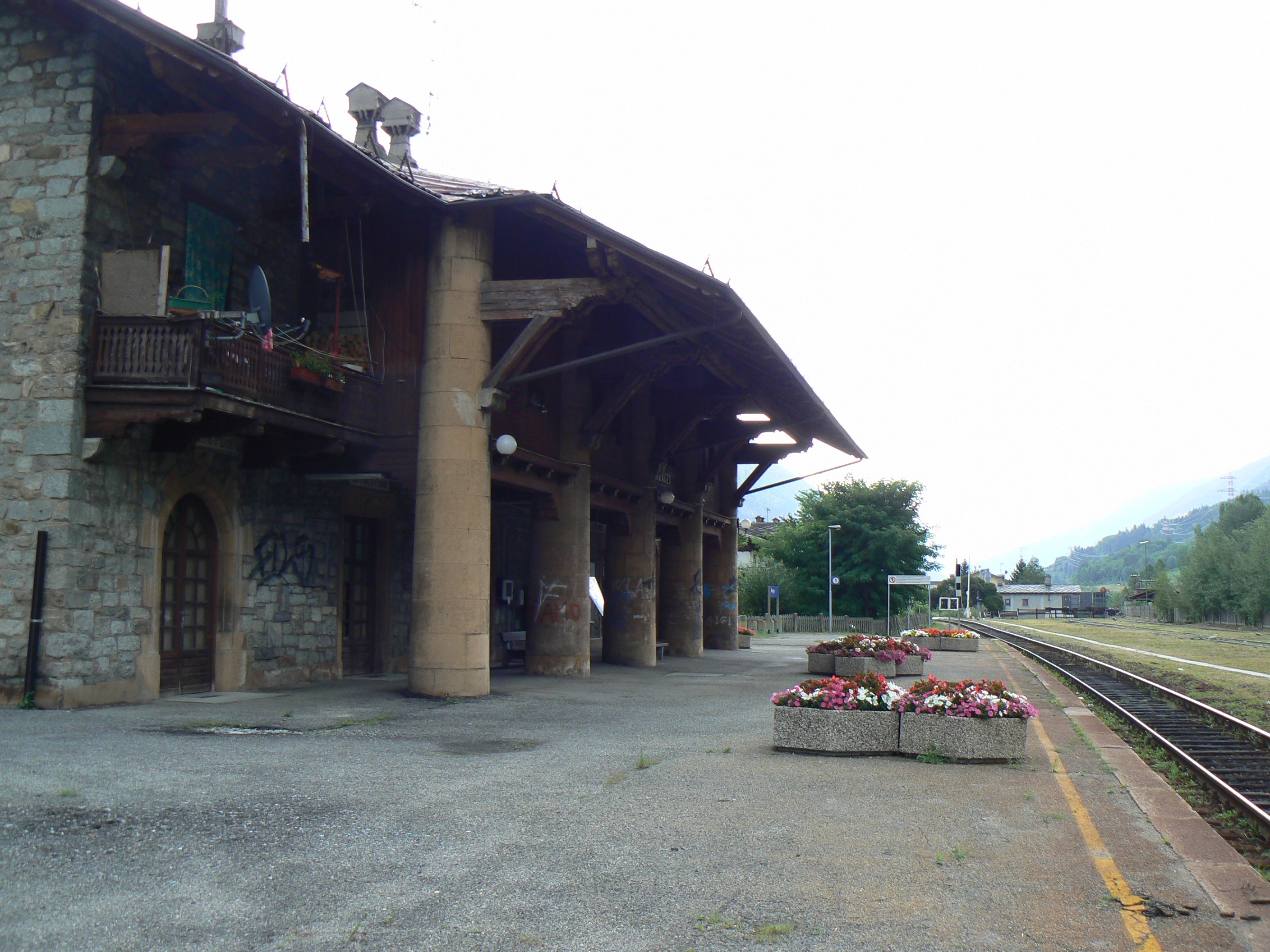 stazione di Morgex. Morgex, Valle d'Aosta, Italia.